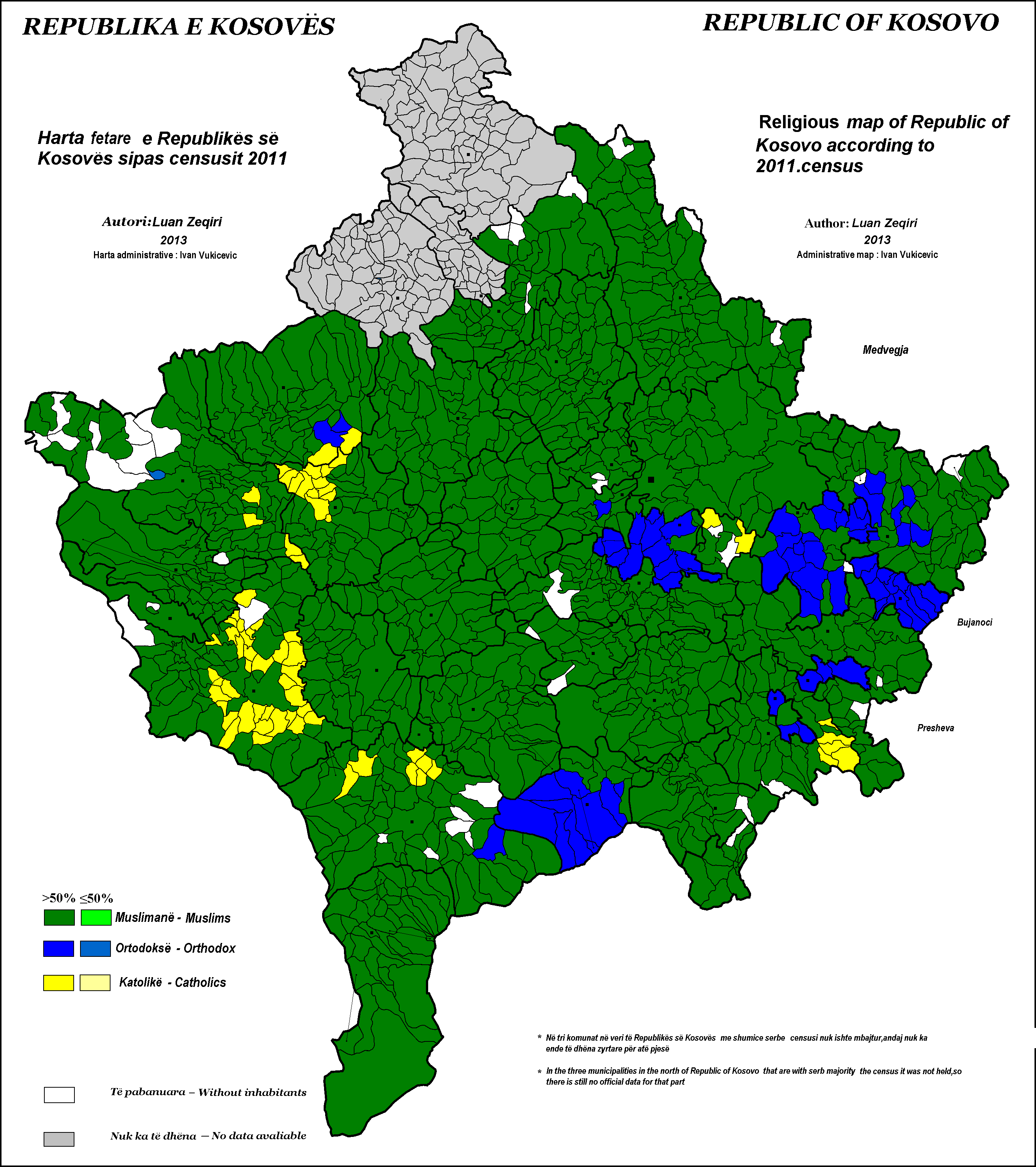 Harta fetare e Kosoves me 2011